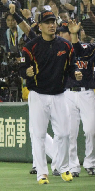 Masahiro Tanaka